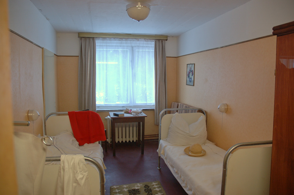 Prora - Innenansicht eines Zimmers